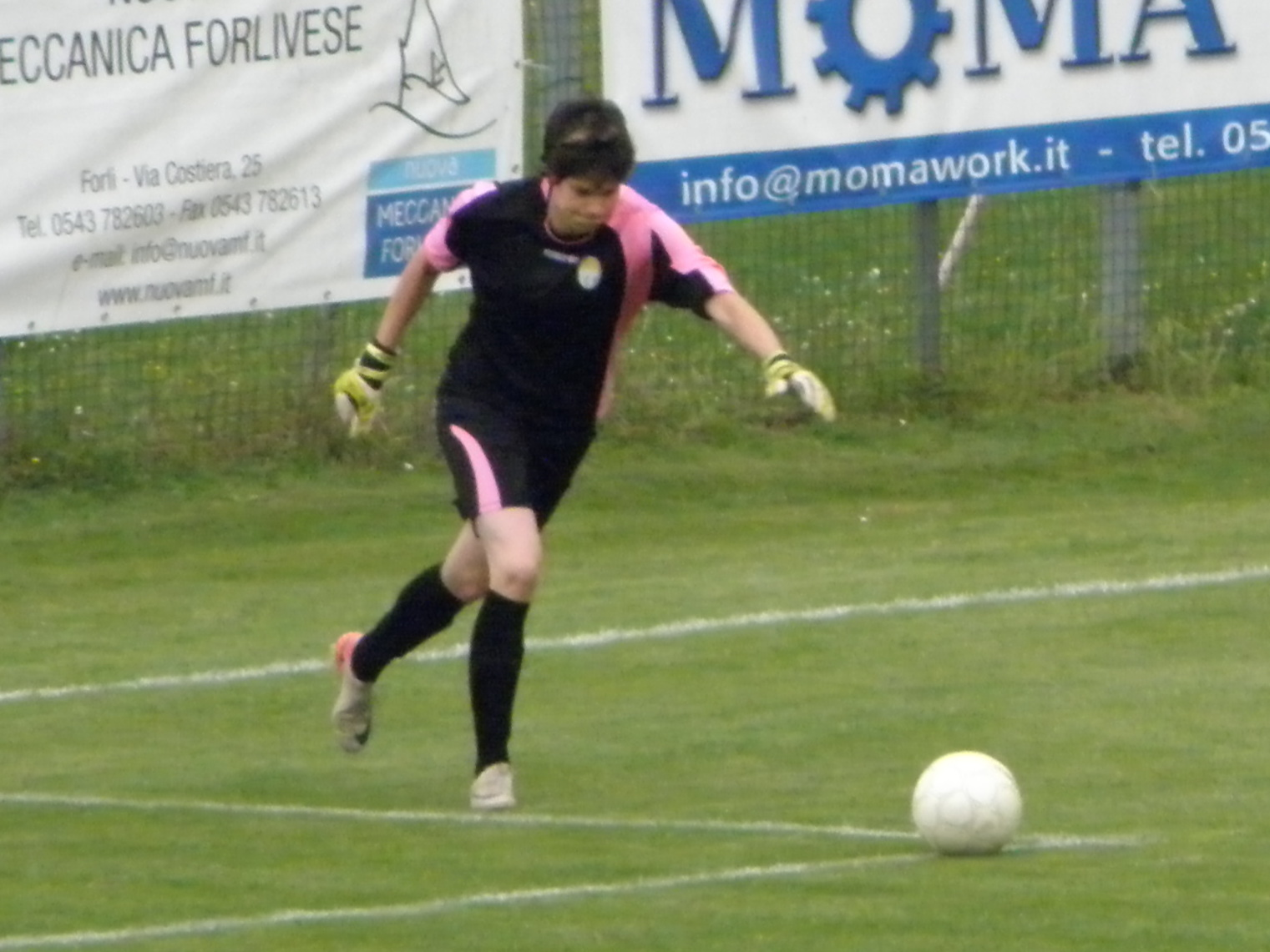 Milano Marittima, 16 maggio 2015, play-off del campionato di Sreie A 2014-2015: il portiere dei Riviera di Romagna Sabrina Tasselli in una fase di gioco.